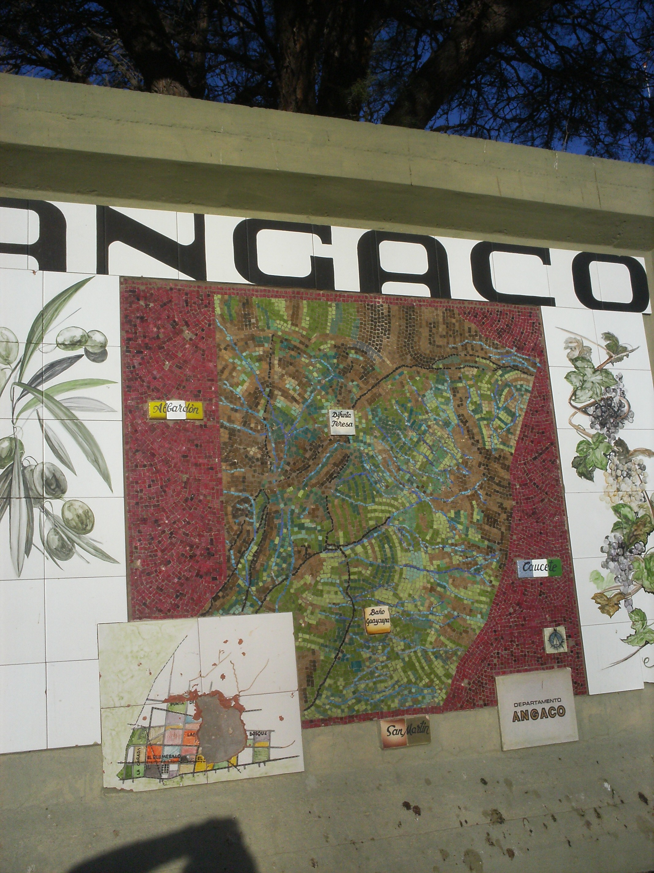 el mapa del departamento sanjuanino